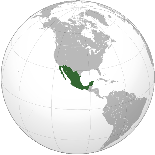 Mapa de Mexico en 1853 con el territorio de La Mesilla.